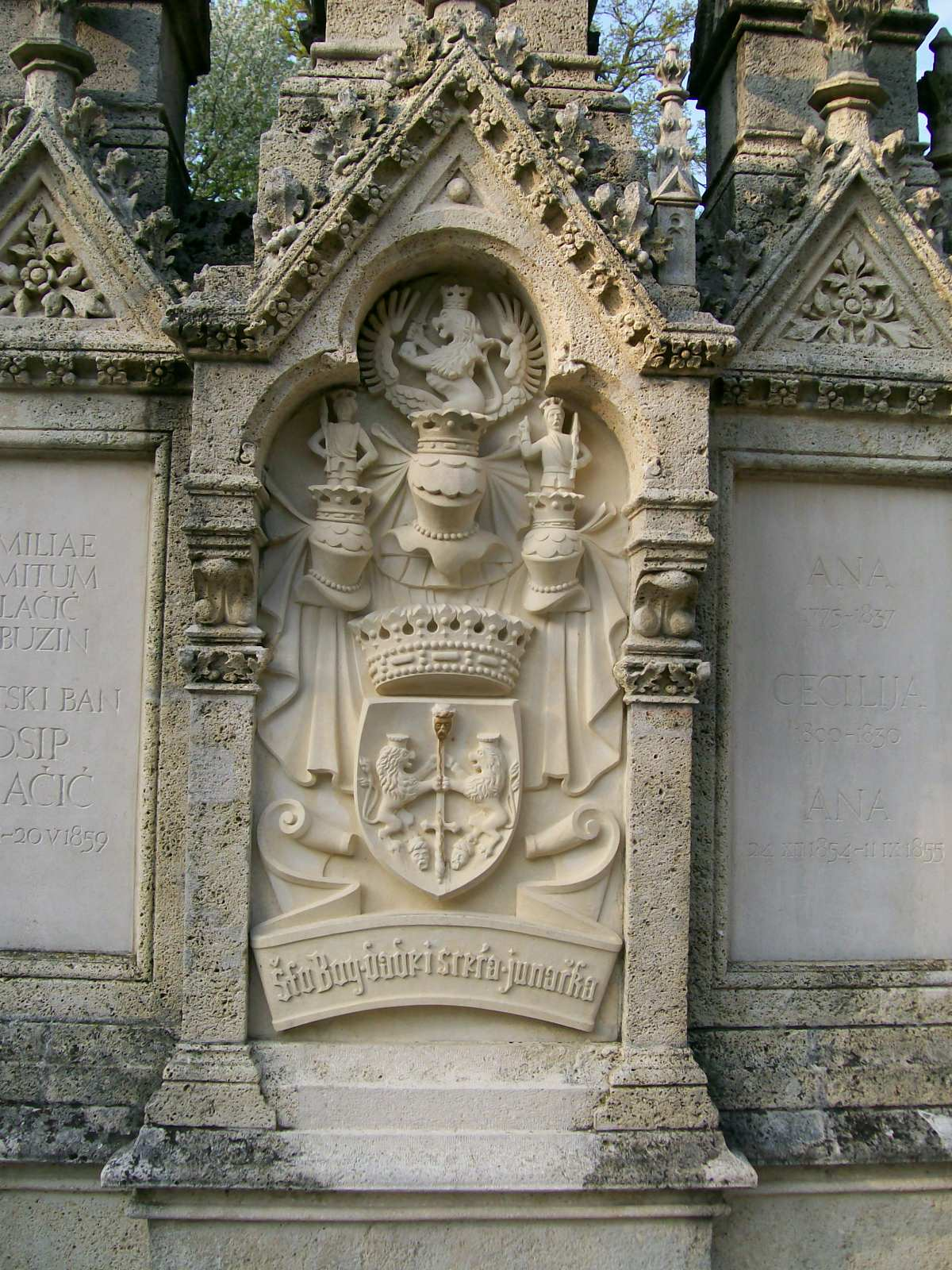 Grb obitelj Jelačić na obiteljskoj grobnici, Novi dvori, Zaprešić